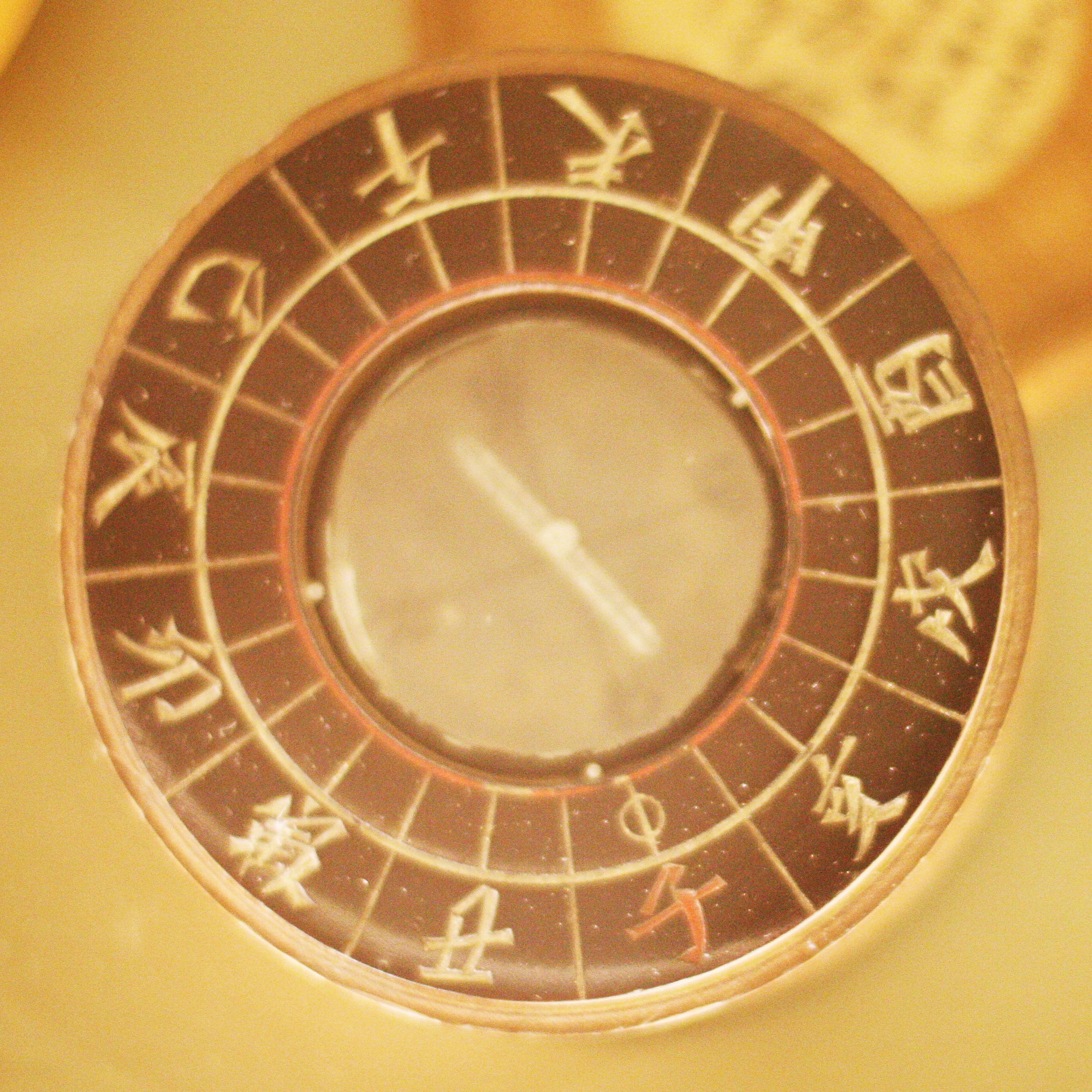 Chinesischer Kompass im Überseemuseum Bremen